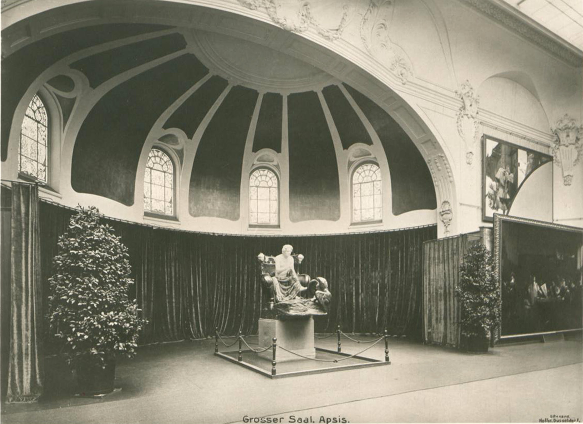 Kunstpalast, Grosser Saal. Apsis. Mit Beethoven Skulptur von Max Klinger, Foto Otto Renard, 1902